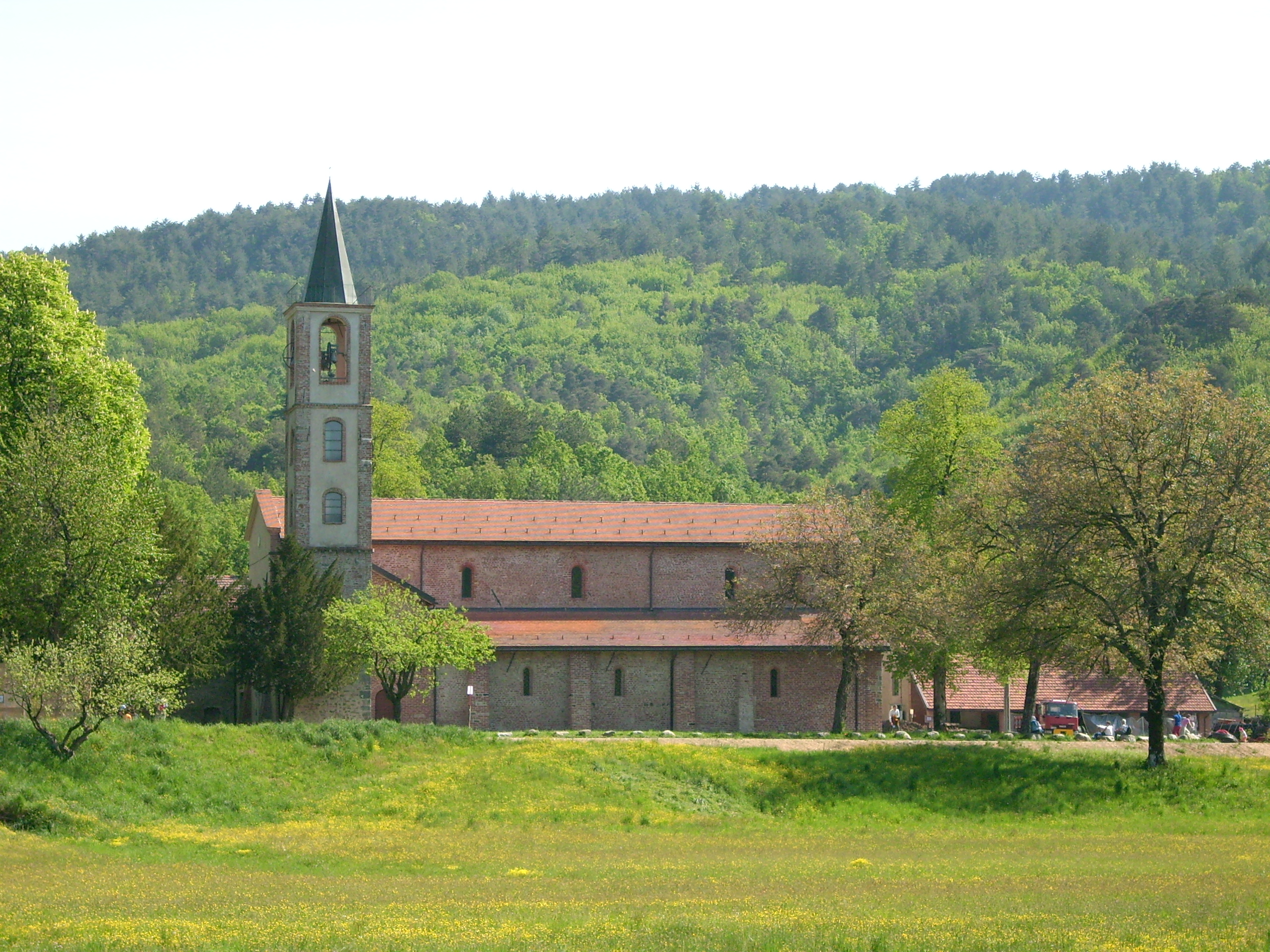 Badia di Tiglieto, Liguria, Italia